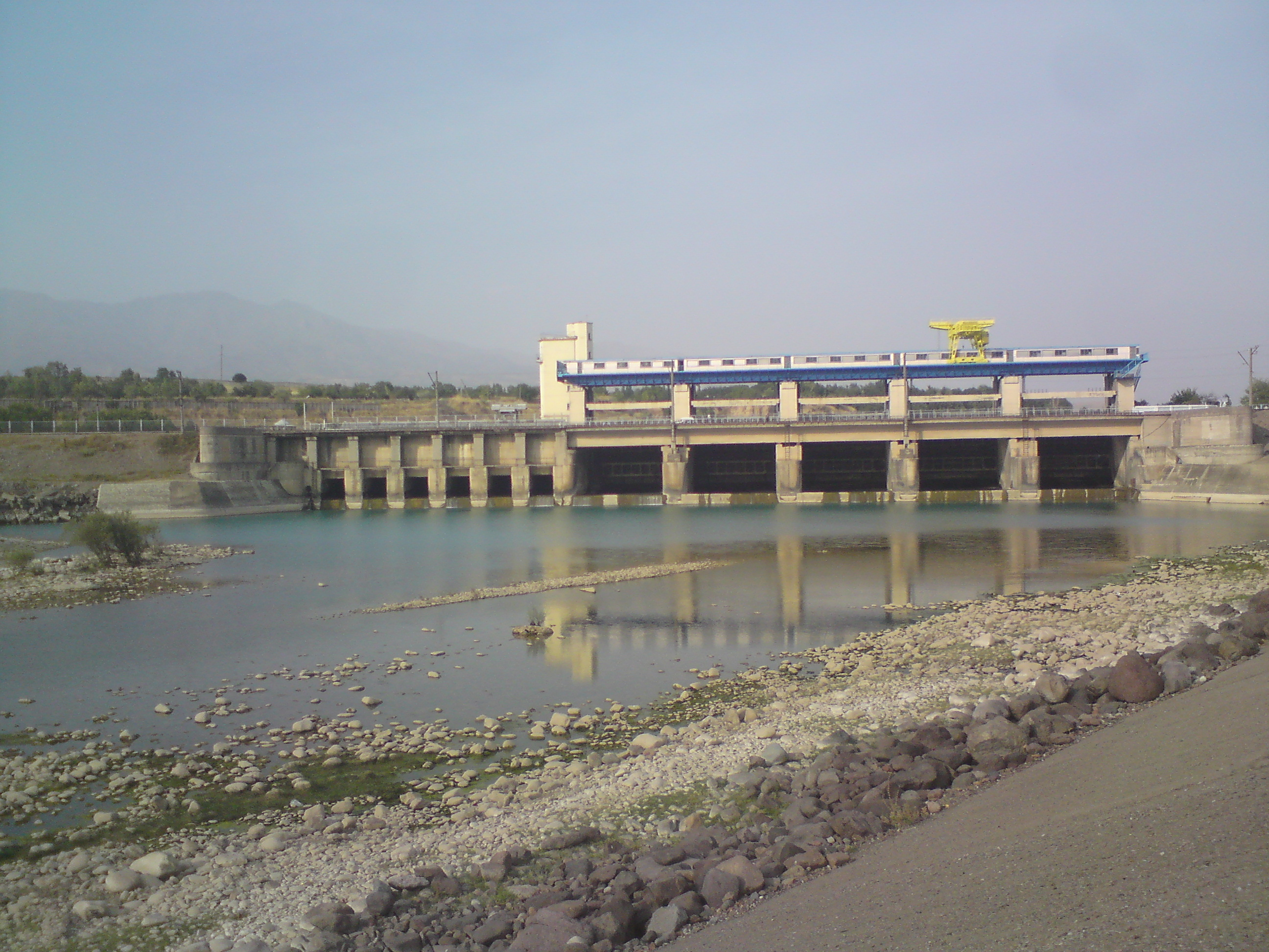 Плотина Газалкентского гидроузла на реке Чирчик, Ташкентский вилоят